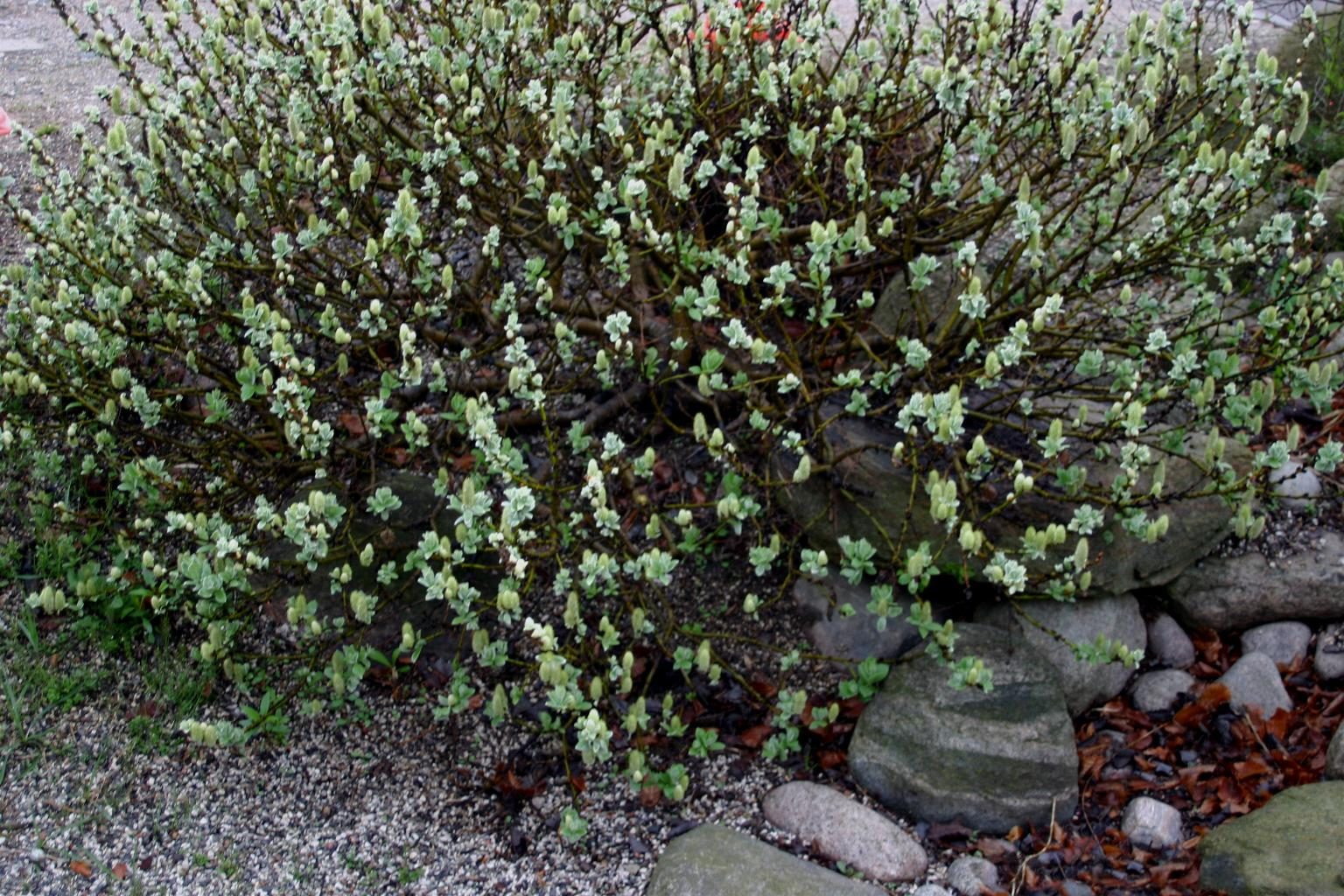 Salix lanata: Habit